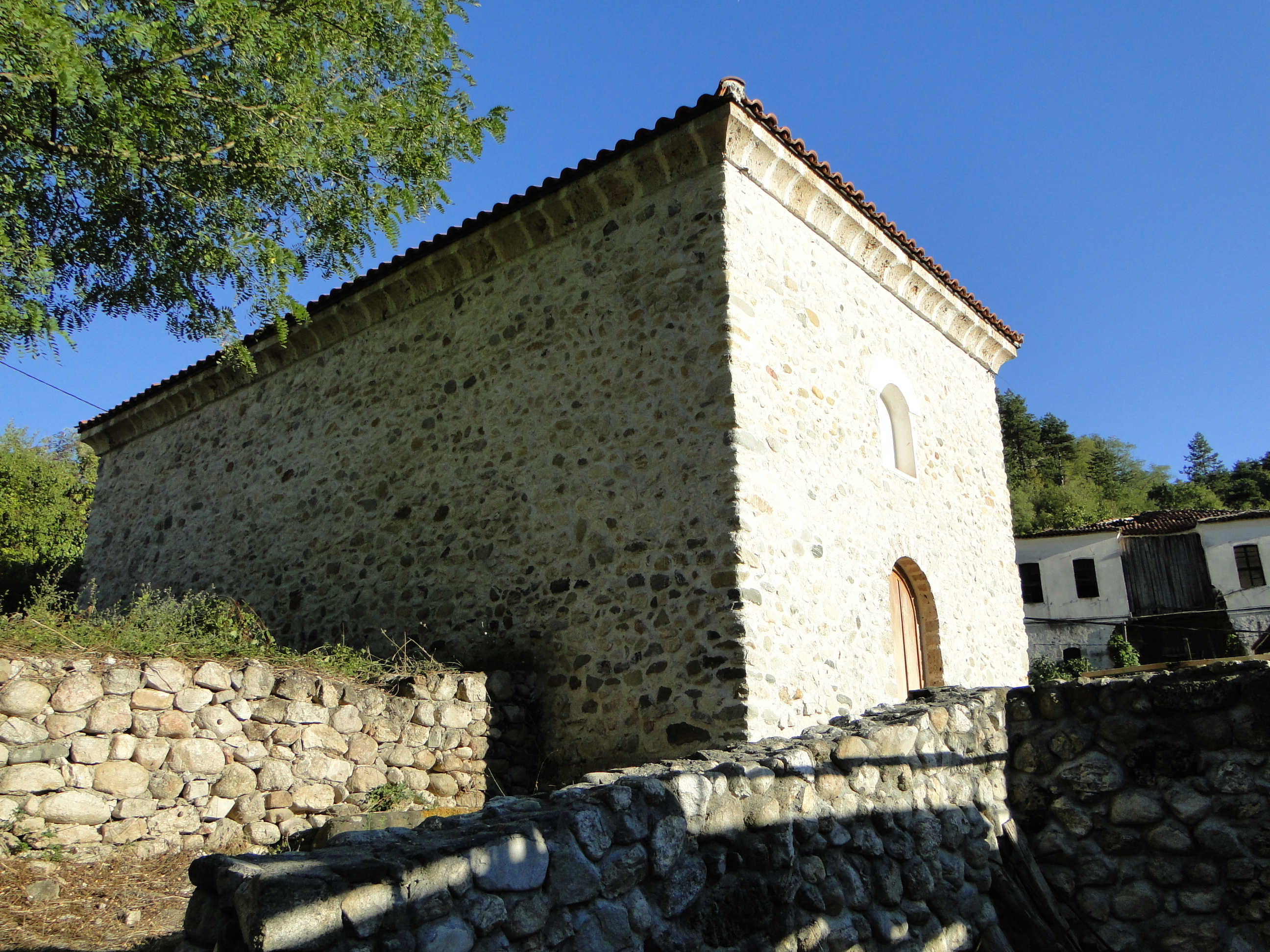 Мелник